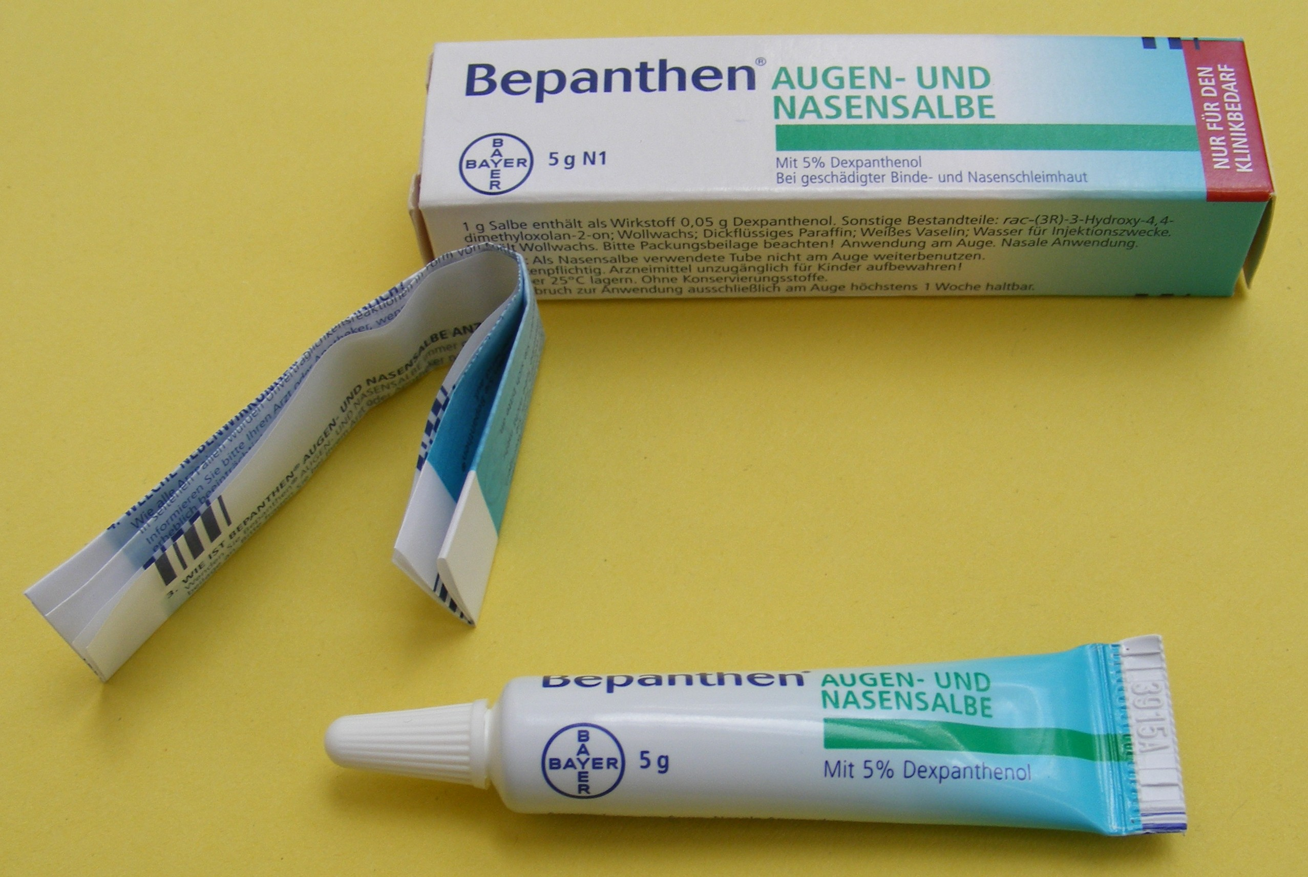 Bepanthen BAYER — Augen- und Nasensalbe (Wundheilsalbe, Wirkstoff: Dexpanthenol) mit Verpackung und Beipackzettel — Deutschland.